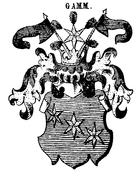 Wappen der von Gamm (auch Gamme)